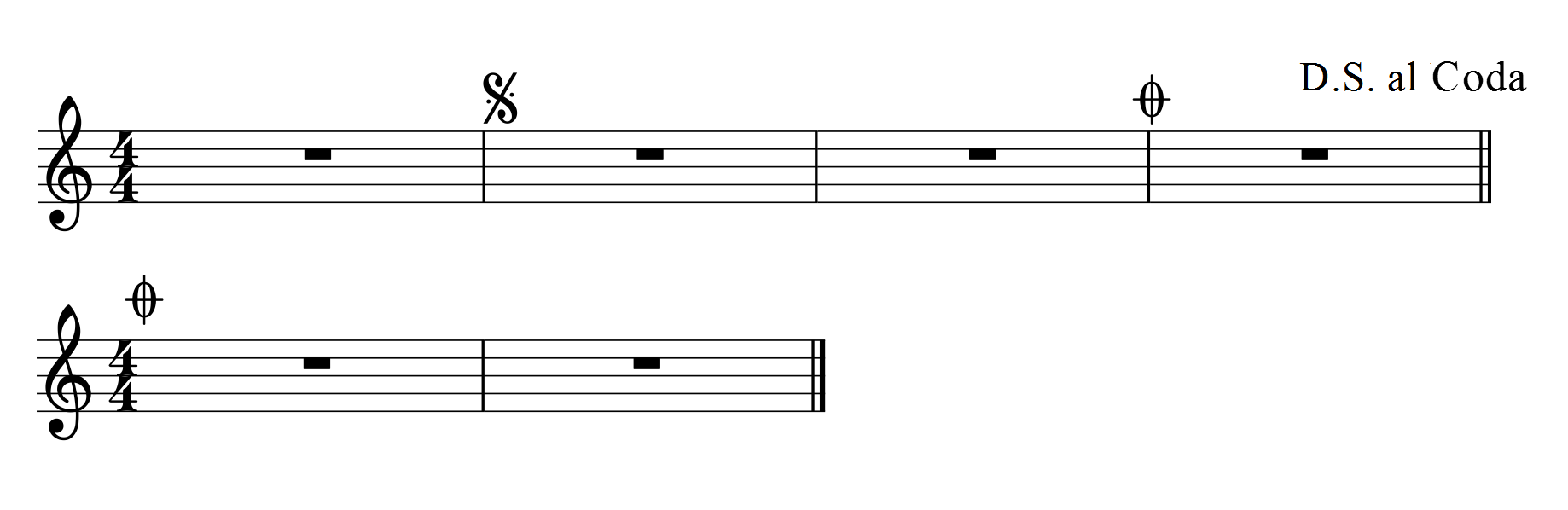 Hecho con MuseScore